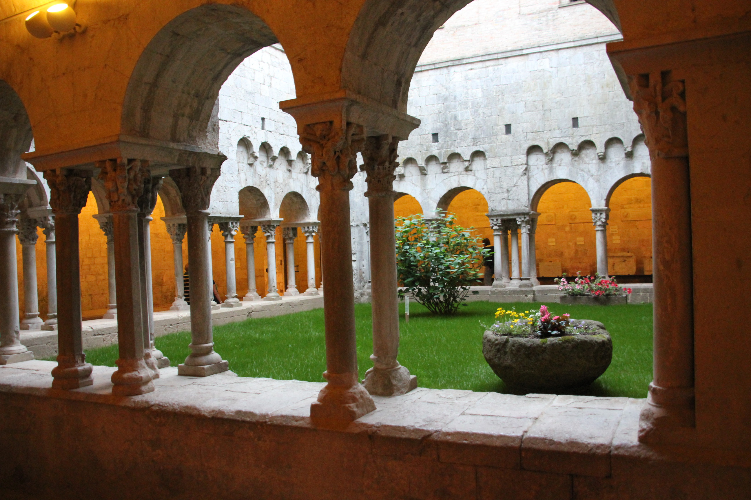 Monestir de Sant Pere de Galligants (Girona)